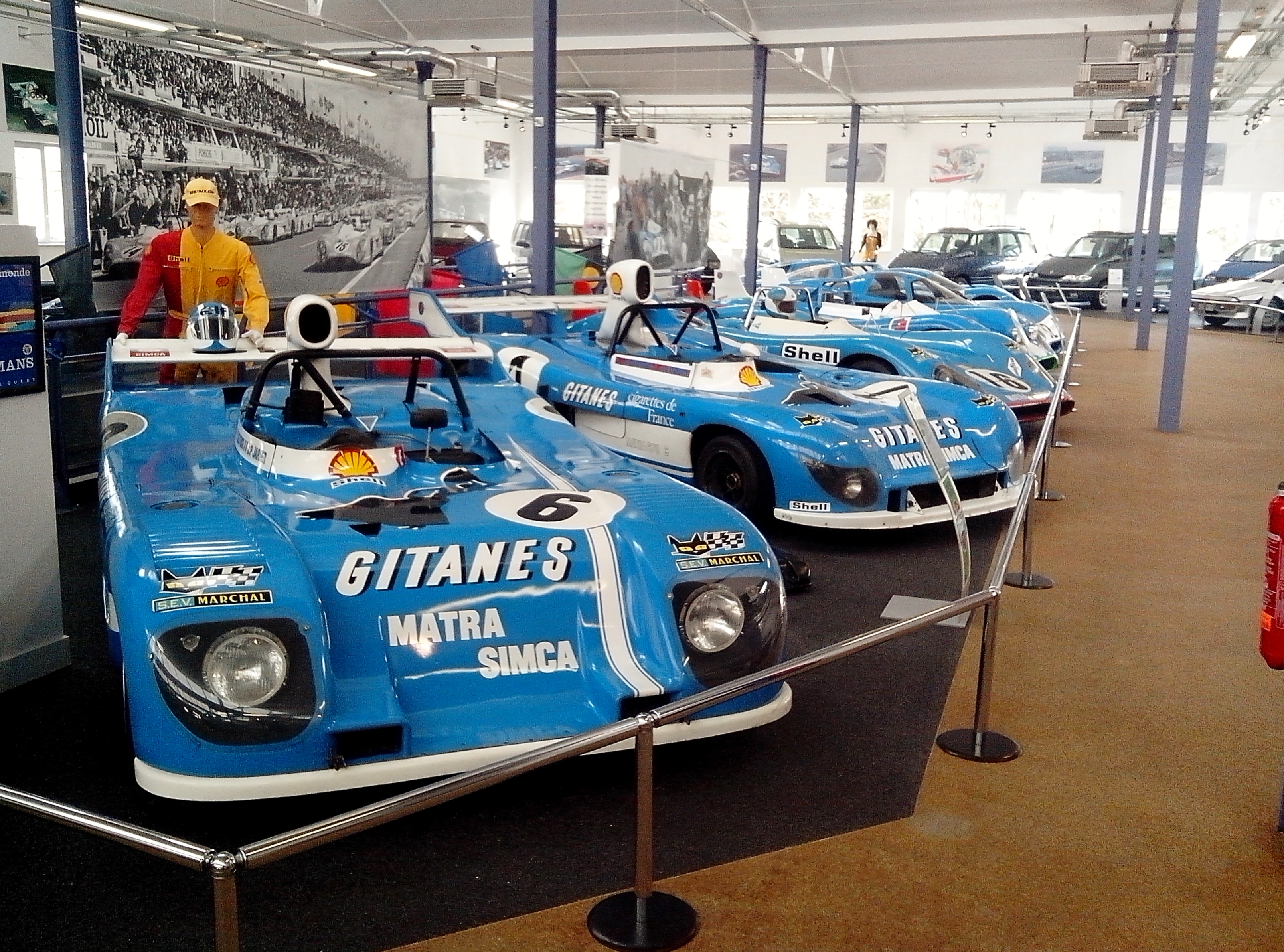 Collection de l'Espace Automobiles Matra